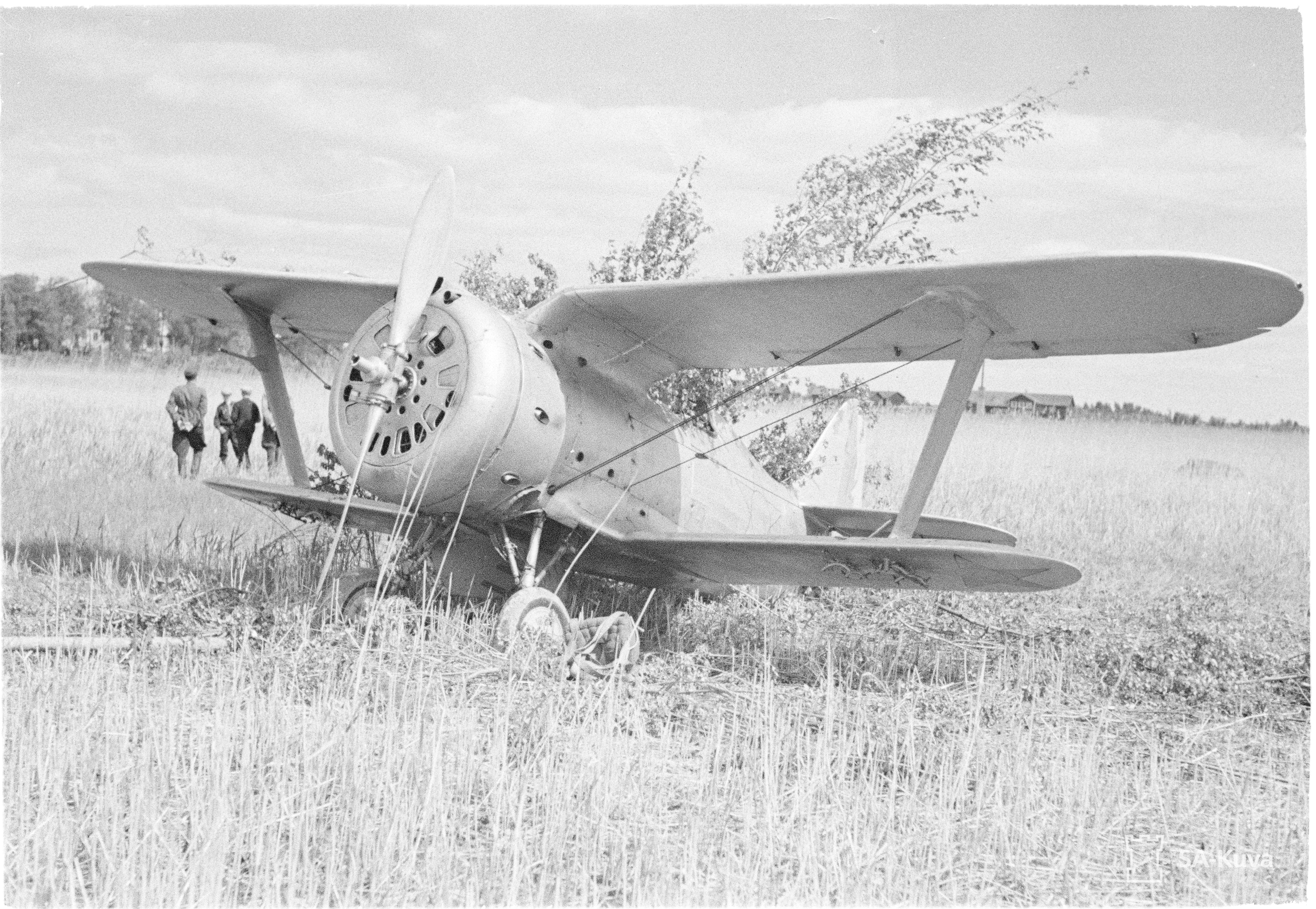 Venäläinen pakkolaskun tehnyt hävittäjälentokone. (Kuvassa on Polikarpov I-153) Kuvauspaikka: Simpele, Kerimäki k.k.